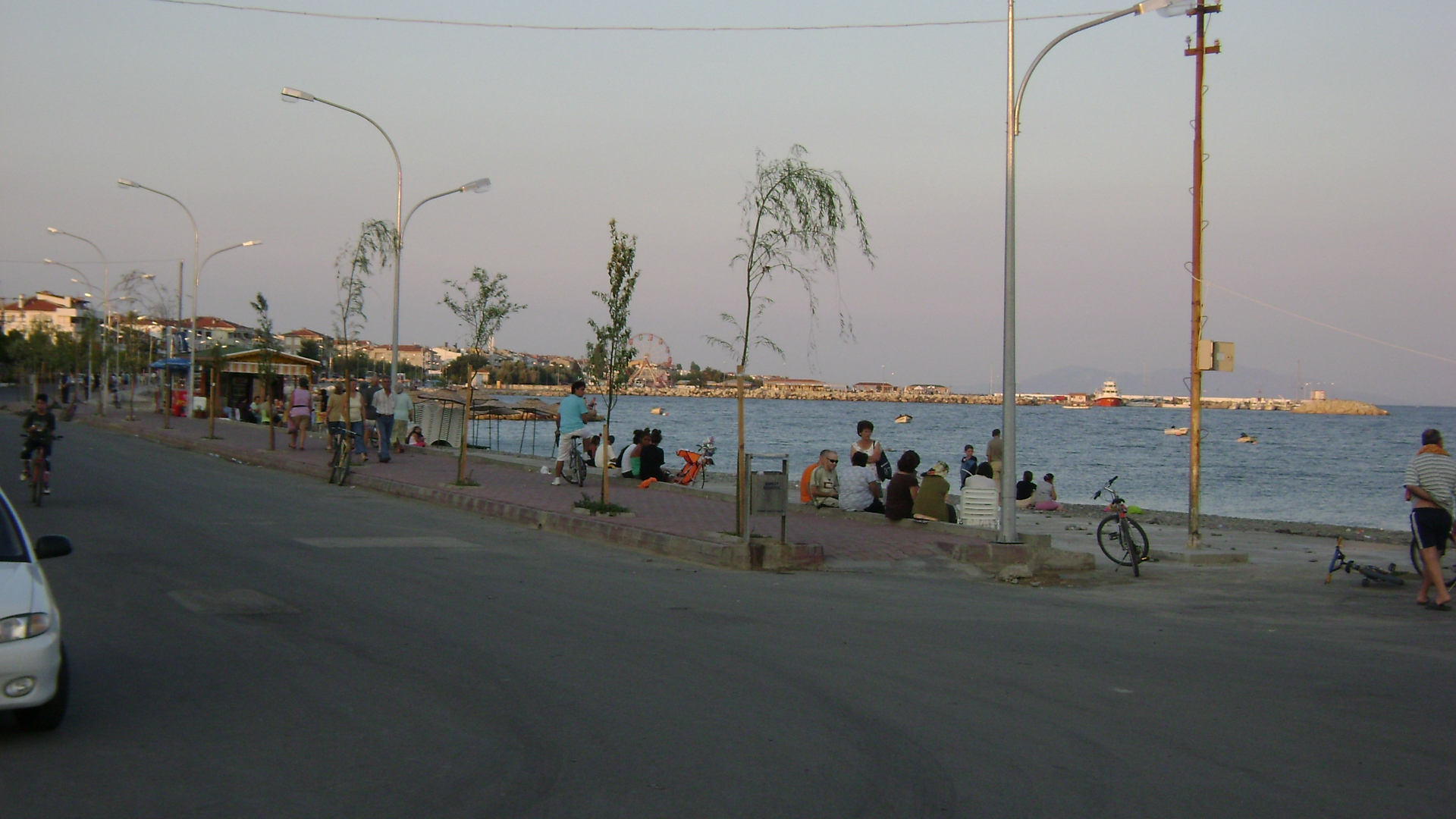 Şarköy, Tekirdağ